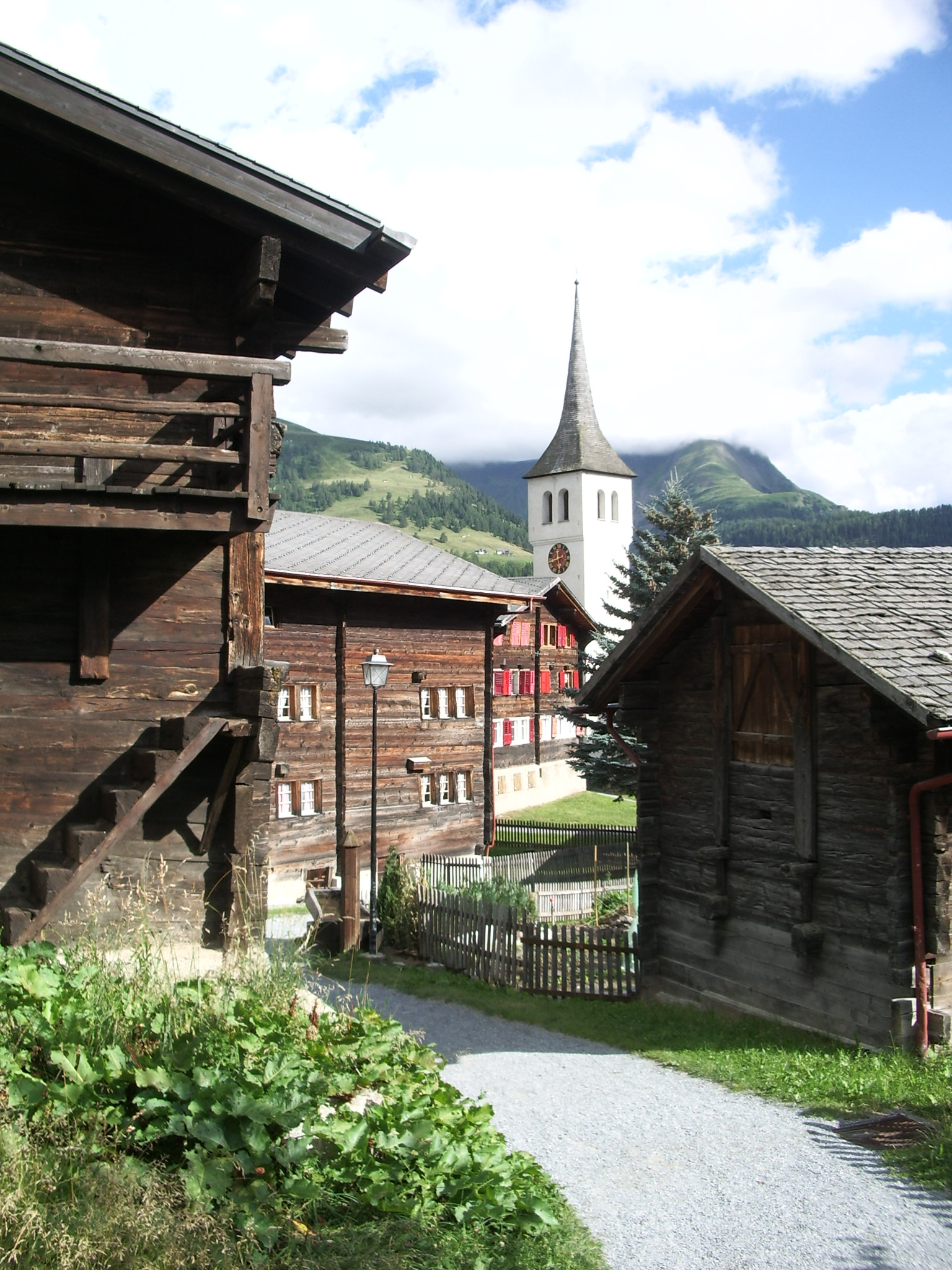 Dorfzentrum von Bellwald. Foto selbst erstellt im Sommer 2006.